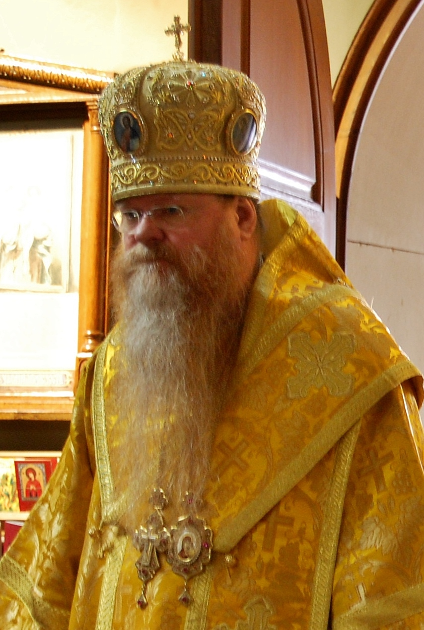 Bischof Agapit (Alexander Goratchek), Bischof der russisch-orthodoxen Auslandskirche in Stuttgart (2013)